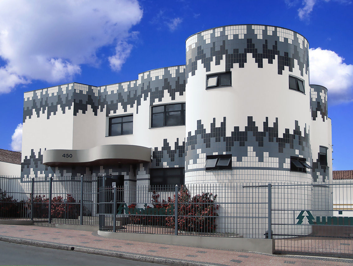 Sede Administrativa Unimed Catanduva